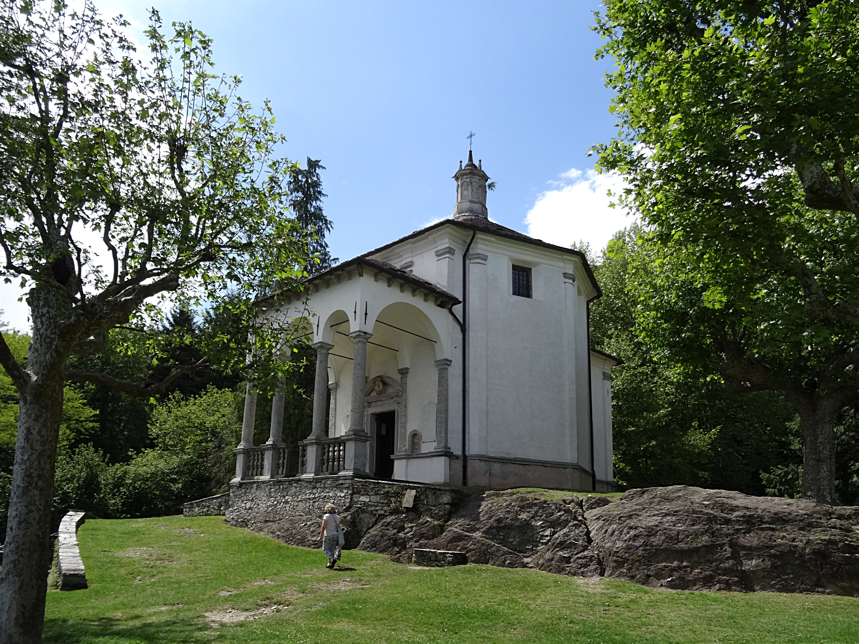 Kapelle Krönung der Jungfrau Maria